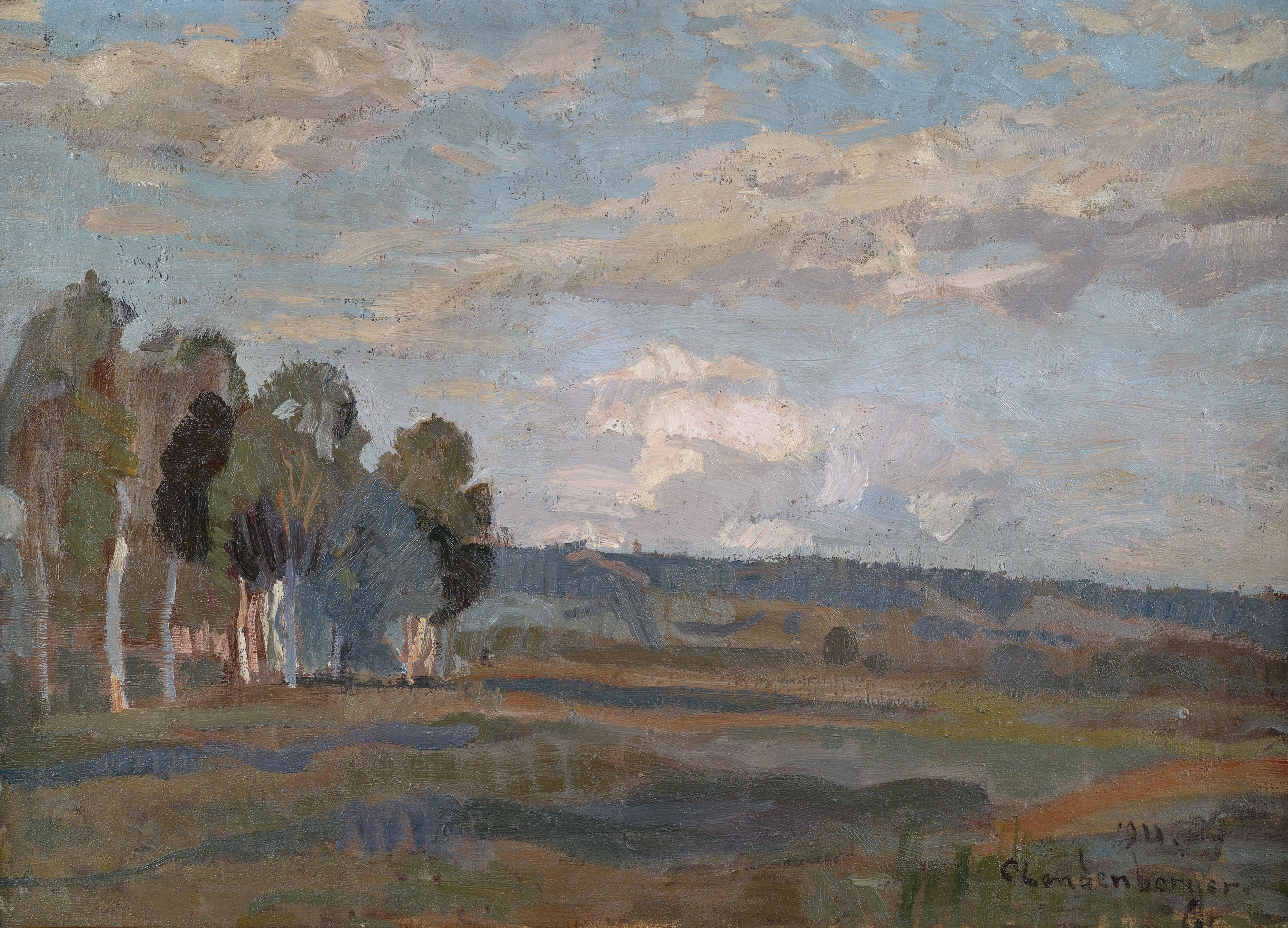 Weite Sommerlandschaft. Öl auf Leinwand, unten rechts signiert und datiert 1911. 50 x 70 cm